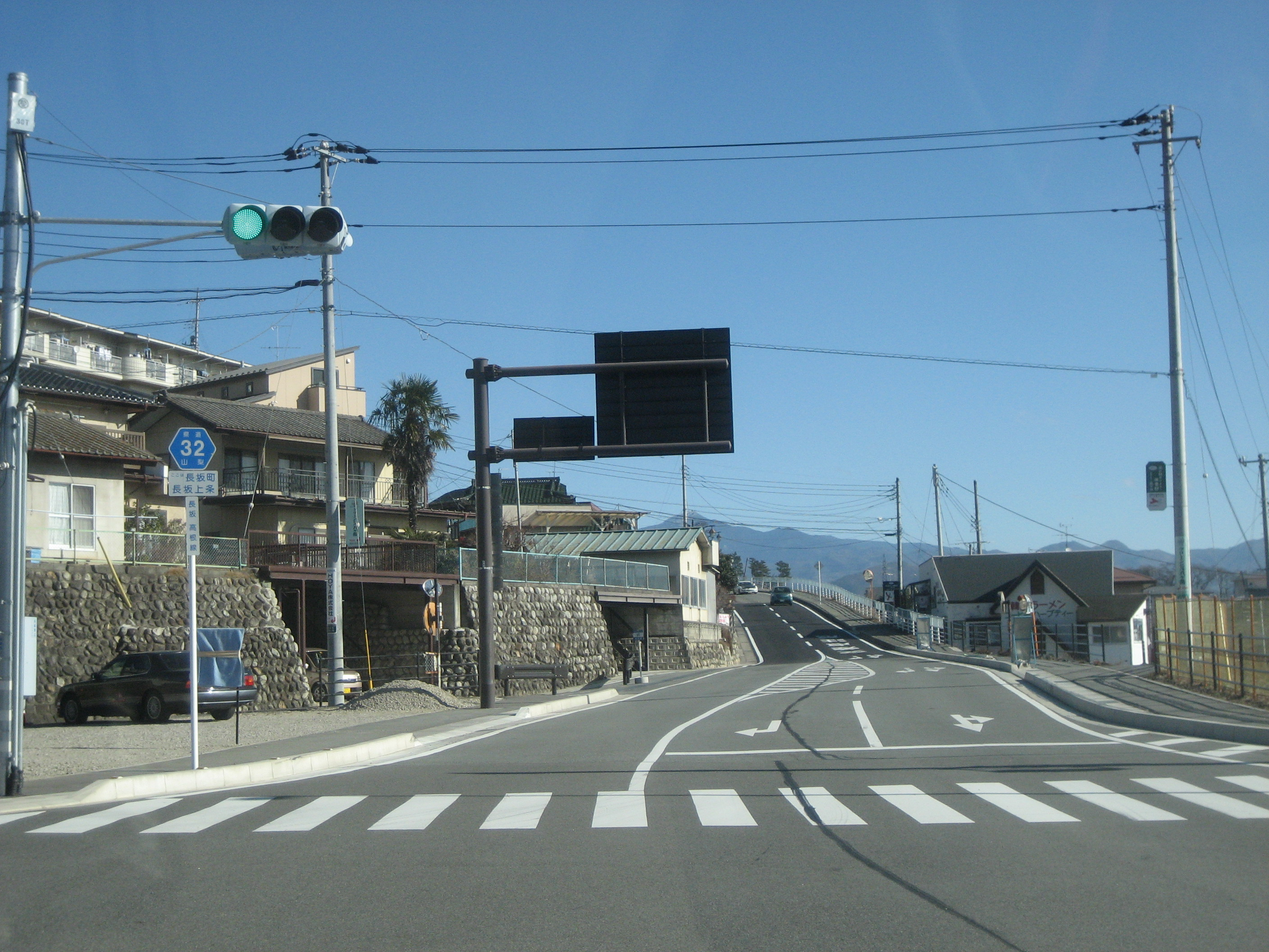 山梨県道32号線北杜市内